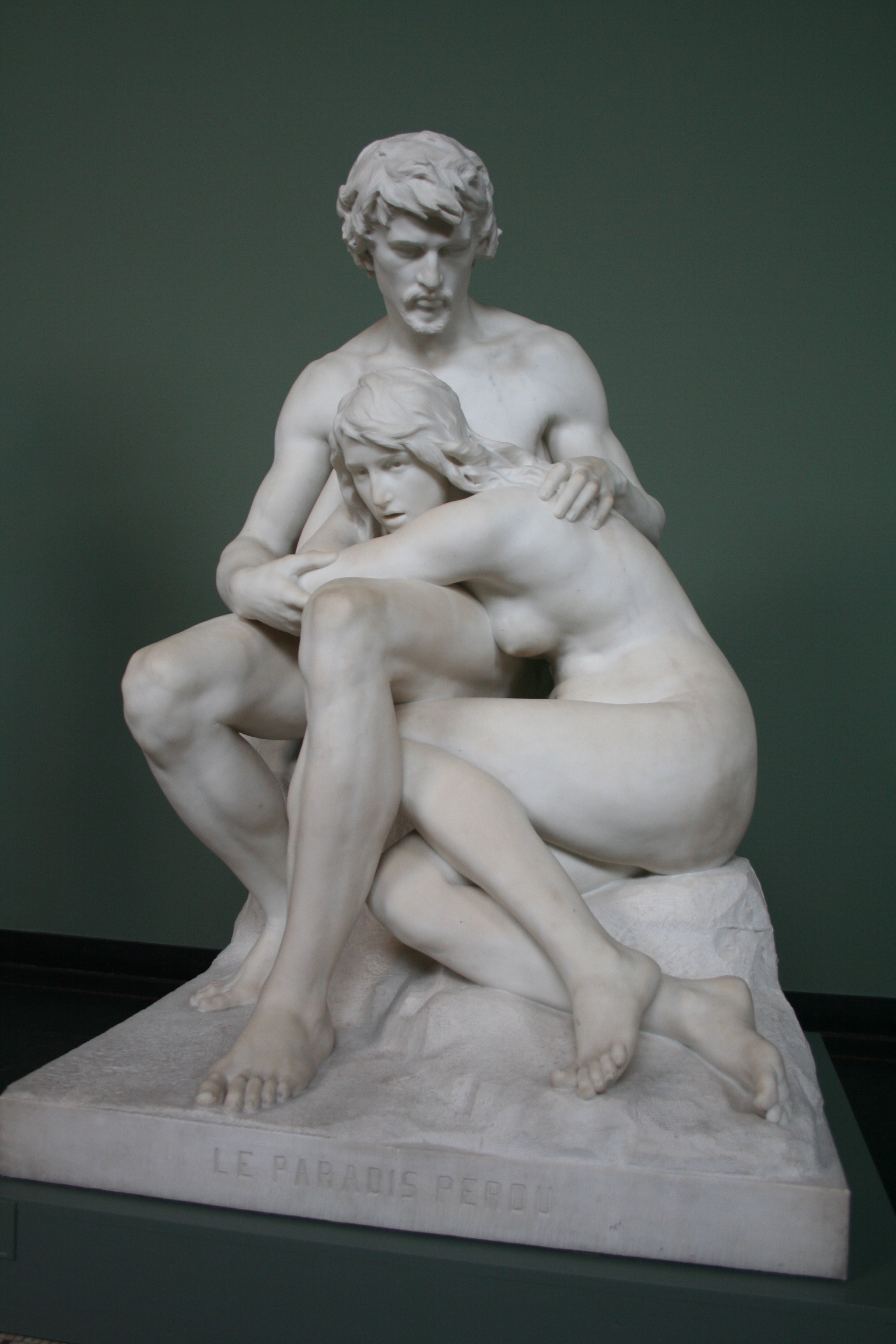 Le Paradis perdu, une sculpture de Jean Gautherin conservée par la Ny Carlsberg Glyptotek, à Copenhague.